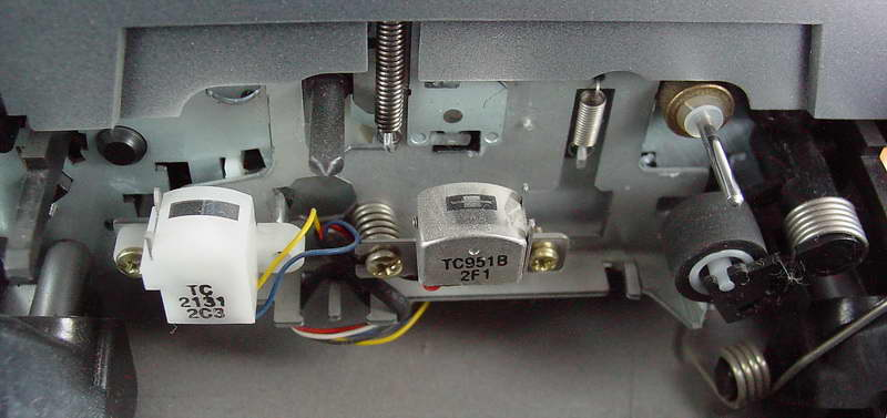 Interior dun cassette Publish by= Luis Miguel Bugallo Sánchez. Self made